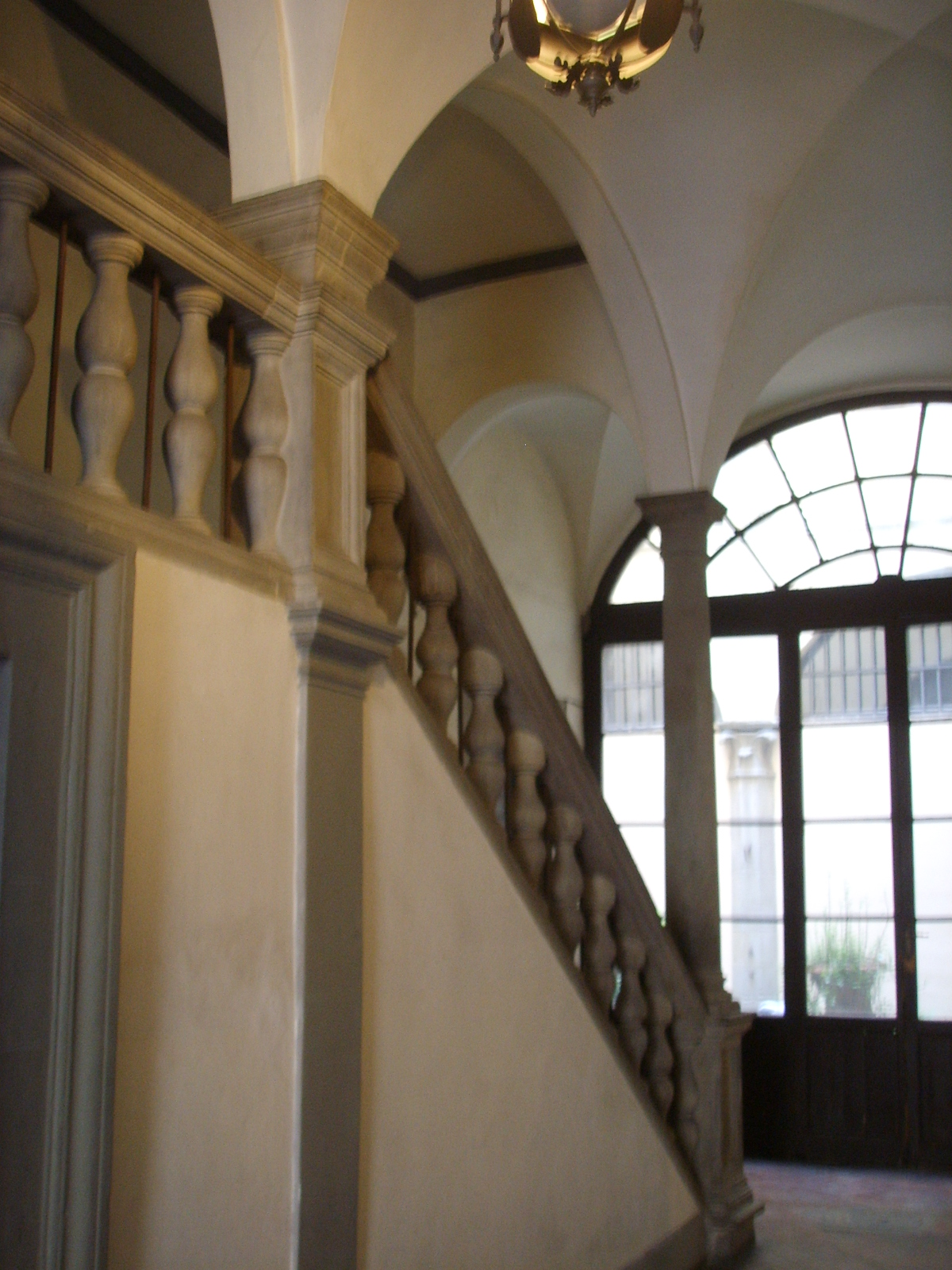 Palazzo gherardi atrio e scala